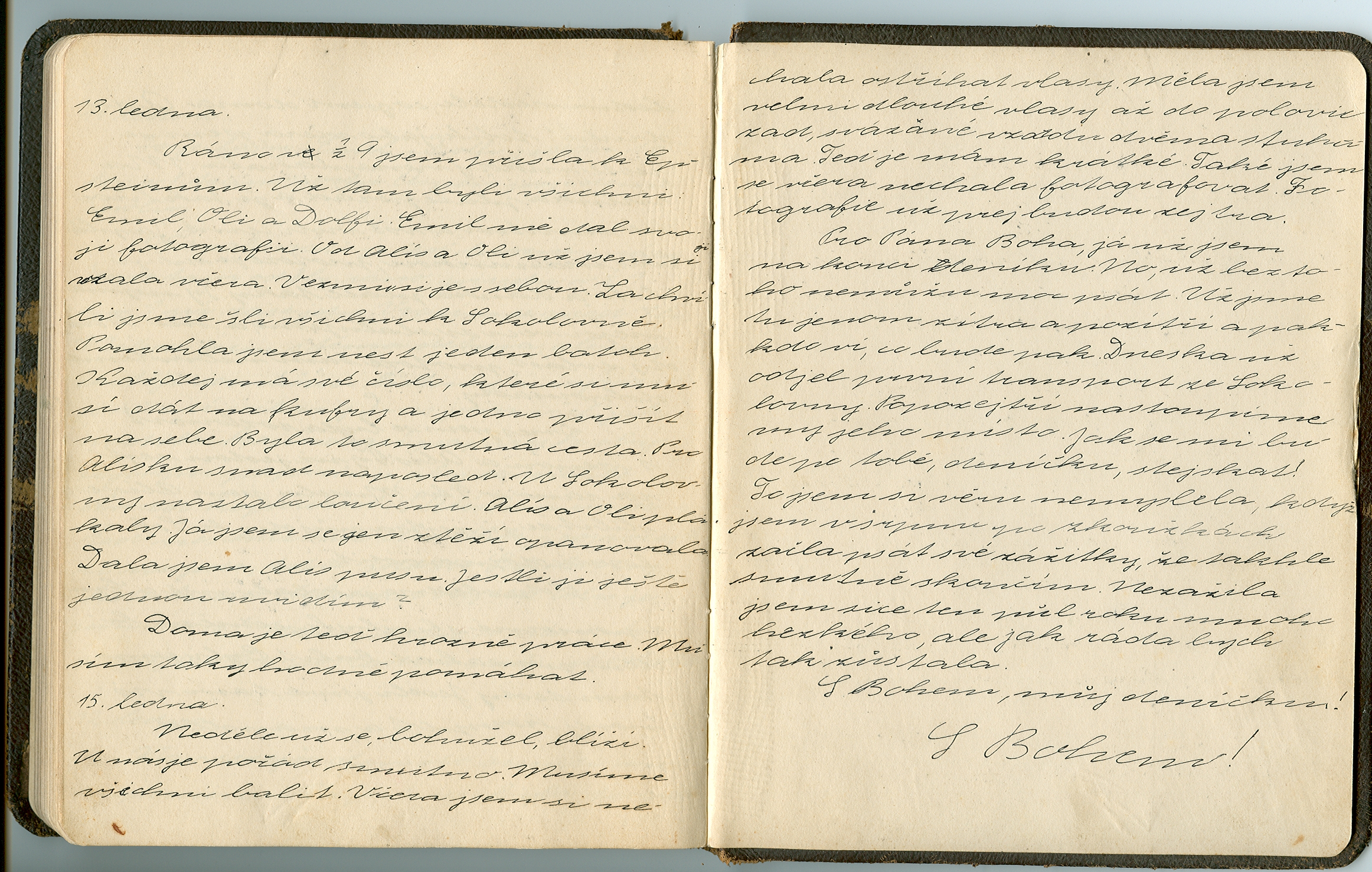 Poslední dvoustránka deníku Věry Kohnové